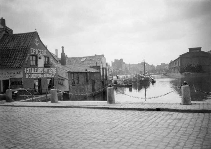 Lille (France (dép. du Nord) — Port Vauban